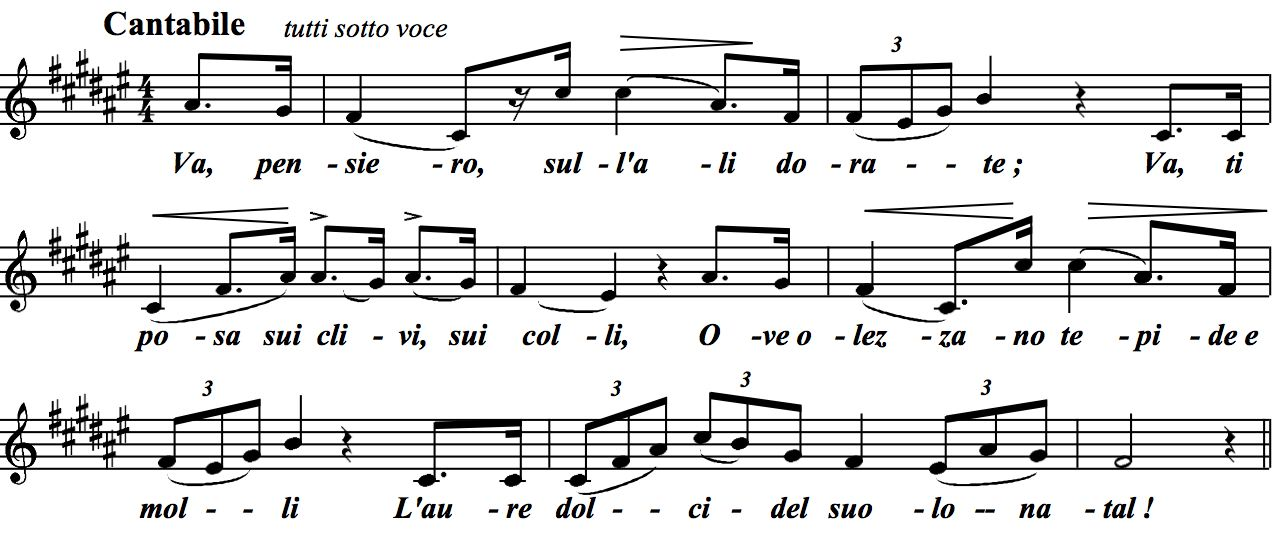 premières mesures de "Va, pensiero", Nabucco (1842) de Giuseppe Verdi